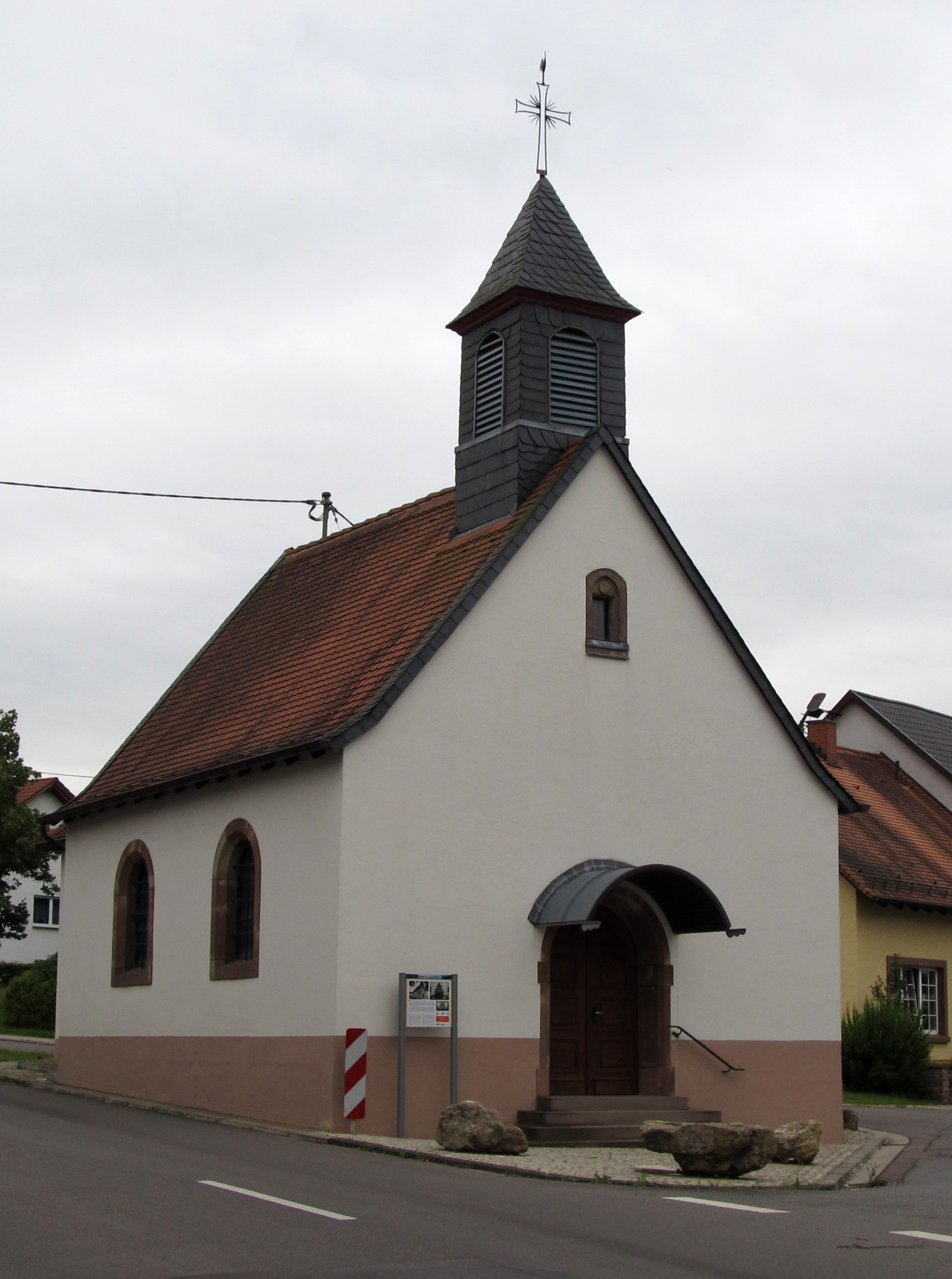 Die St. Annakapelle in Habkirchen, Gemeinde Mandelbachtal, Saarland